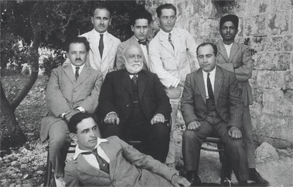 ירושלים - הנהלת הועד הלאומי 1923, באמצע נשיא הועד הלאומי מר דוד ילין, לימינו המזכיר הכללי, משמאל שמואל צ'רנוביץ ןלשמאלו משה אטיאס